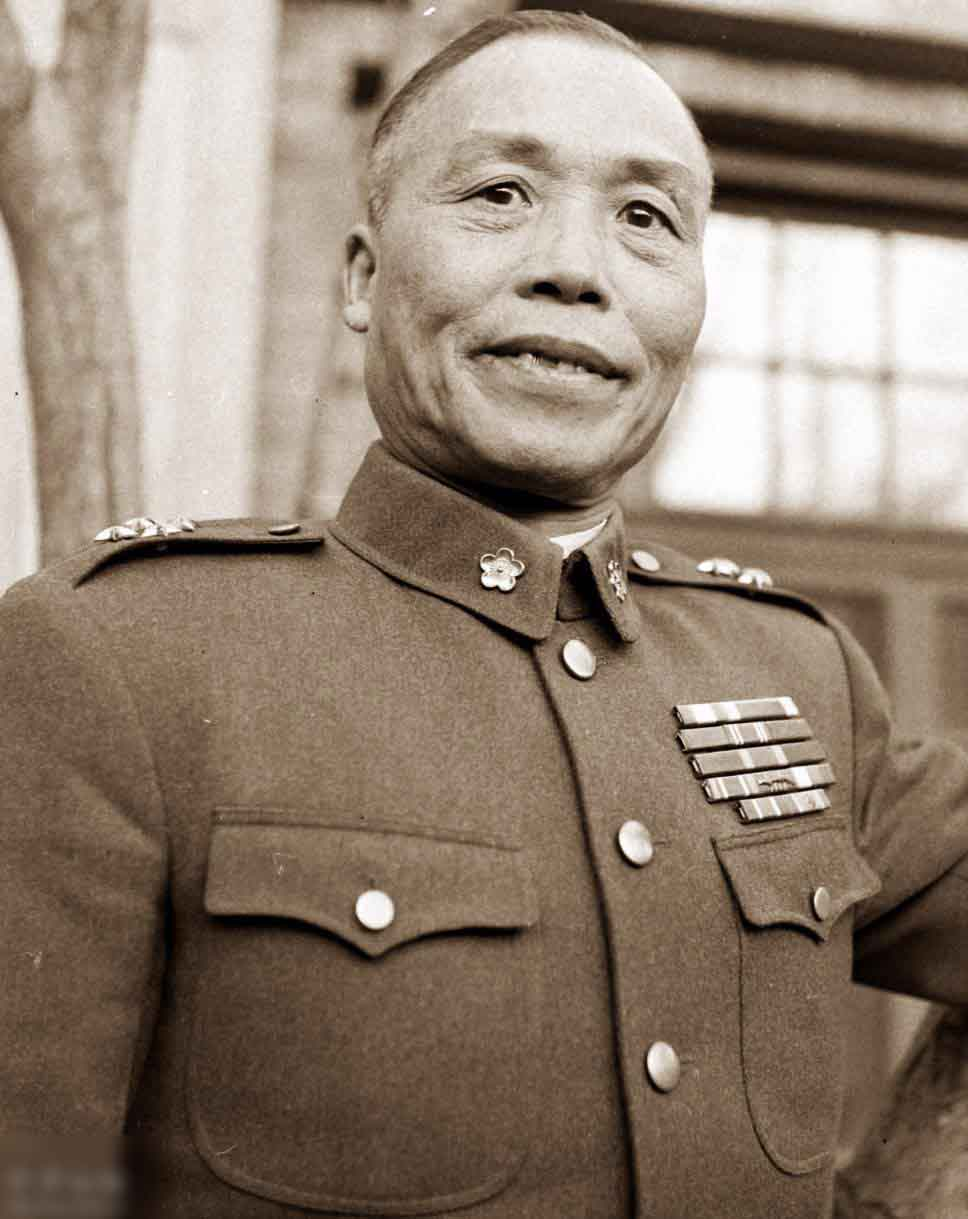 国共内戦前後の頃の李宗仁